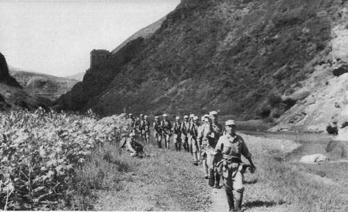 1942年，冀东八路军转到外线作战，扩大抗日根据地。图为八路军通过司马台。